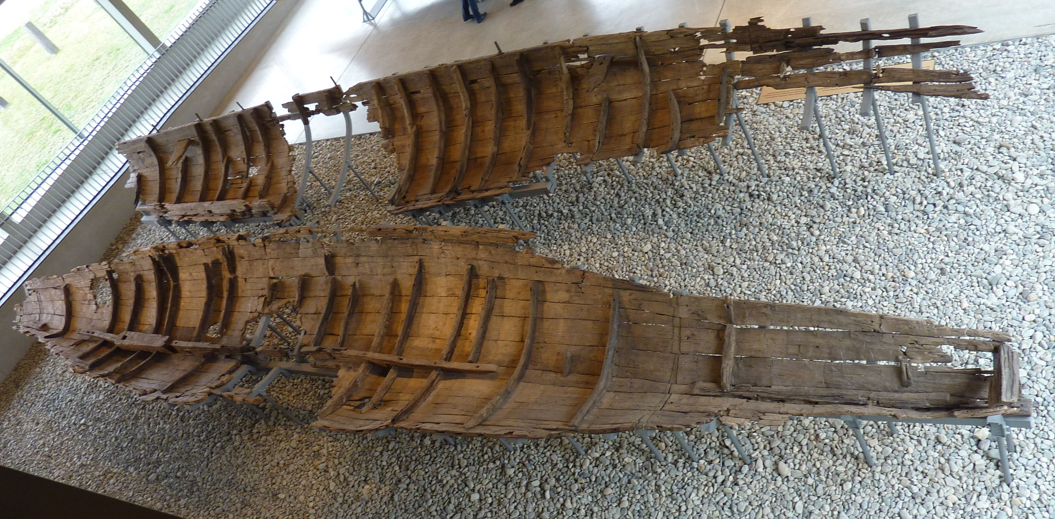 Überreste zweier römischer Schiffe